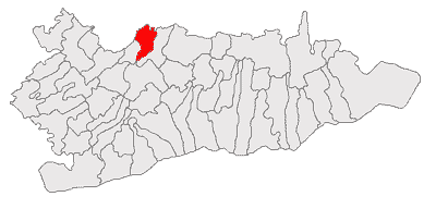 Categorie:Hărţi ale judeţului Călăraşi